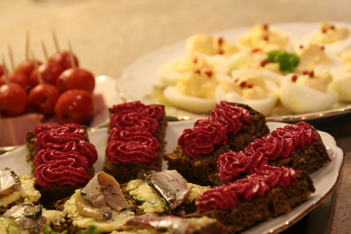 Rahvuslikud pidupäevatoidud 24. veebruaril 2013 Tartus